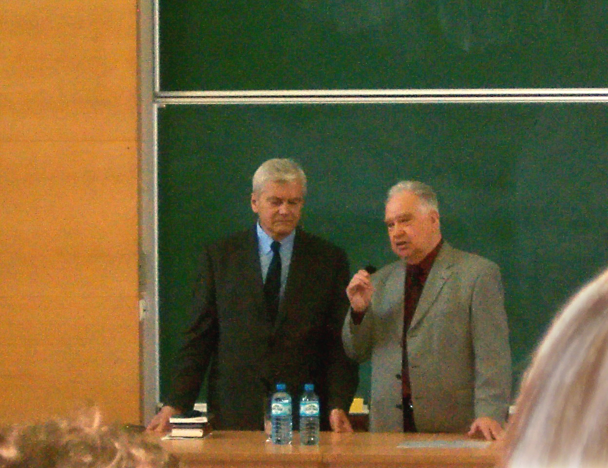 Prof. dr hab. Lech Gardocki I Prezes Sądu Najwyższego i prof. dr hab. Andrzej Jan Szwarc Dziekan Wydziału Prawa i Administracji UAM w Poznaniu.